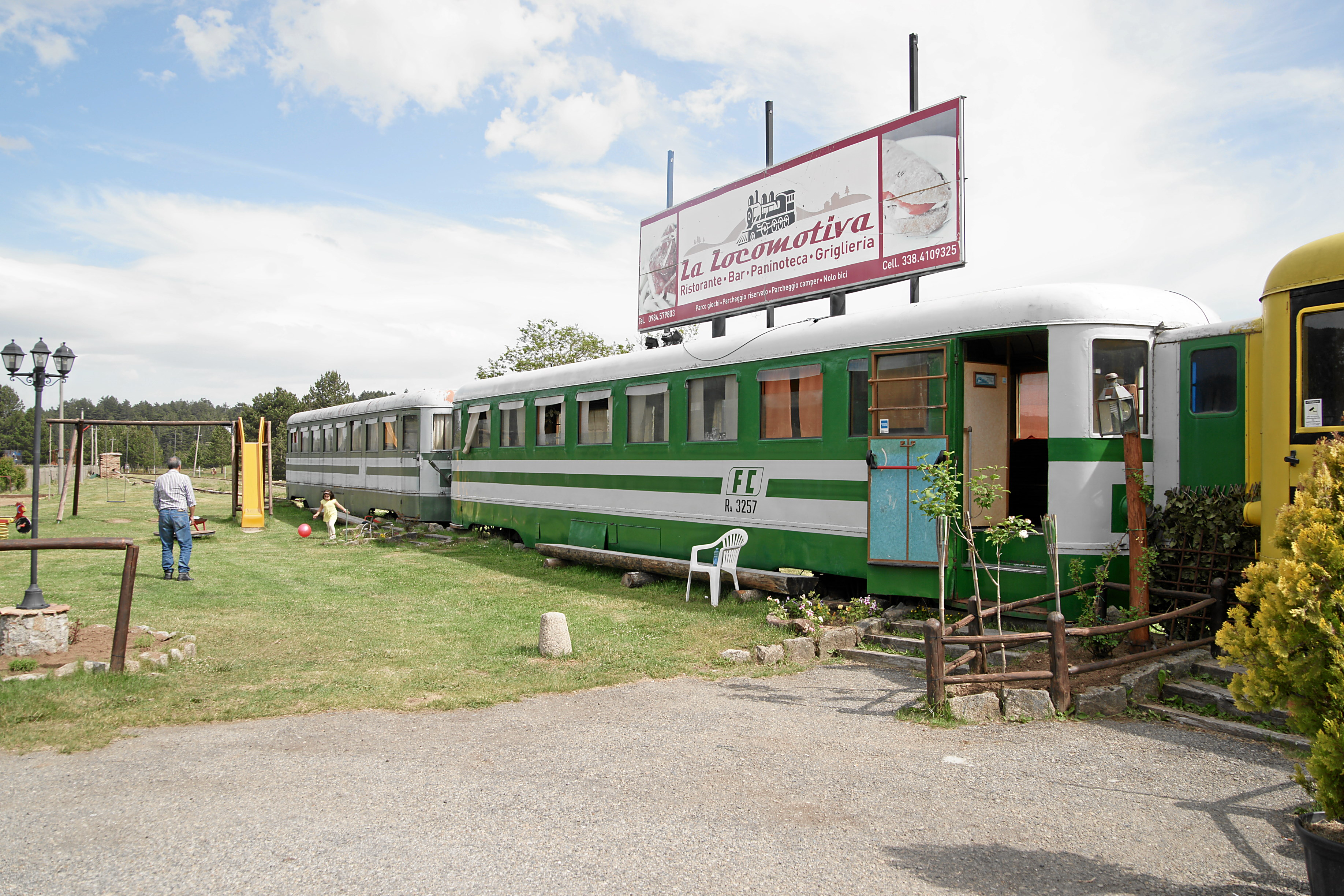 San Nicola Silano: Ristorante La Locomotiva, ehem. Zug der Ferrovie della Calabria